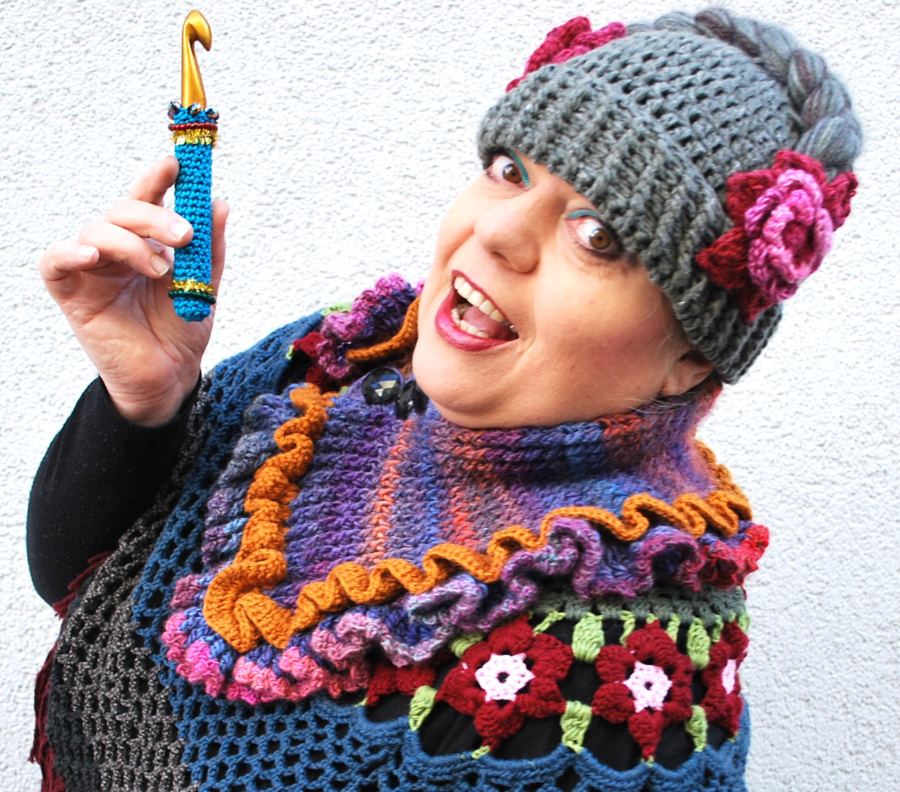 Petra Perle mit Häkelnadel